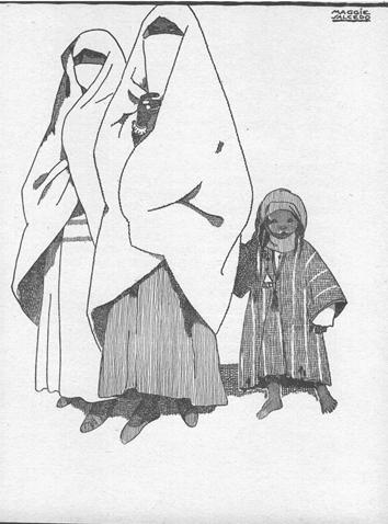 Illustration du livre de Fromentin "Un été dans le Sahara", SUDEL, Paris.